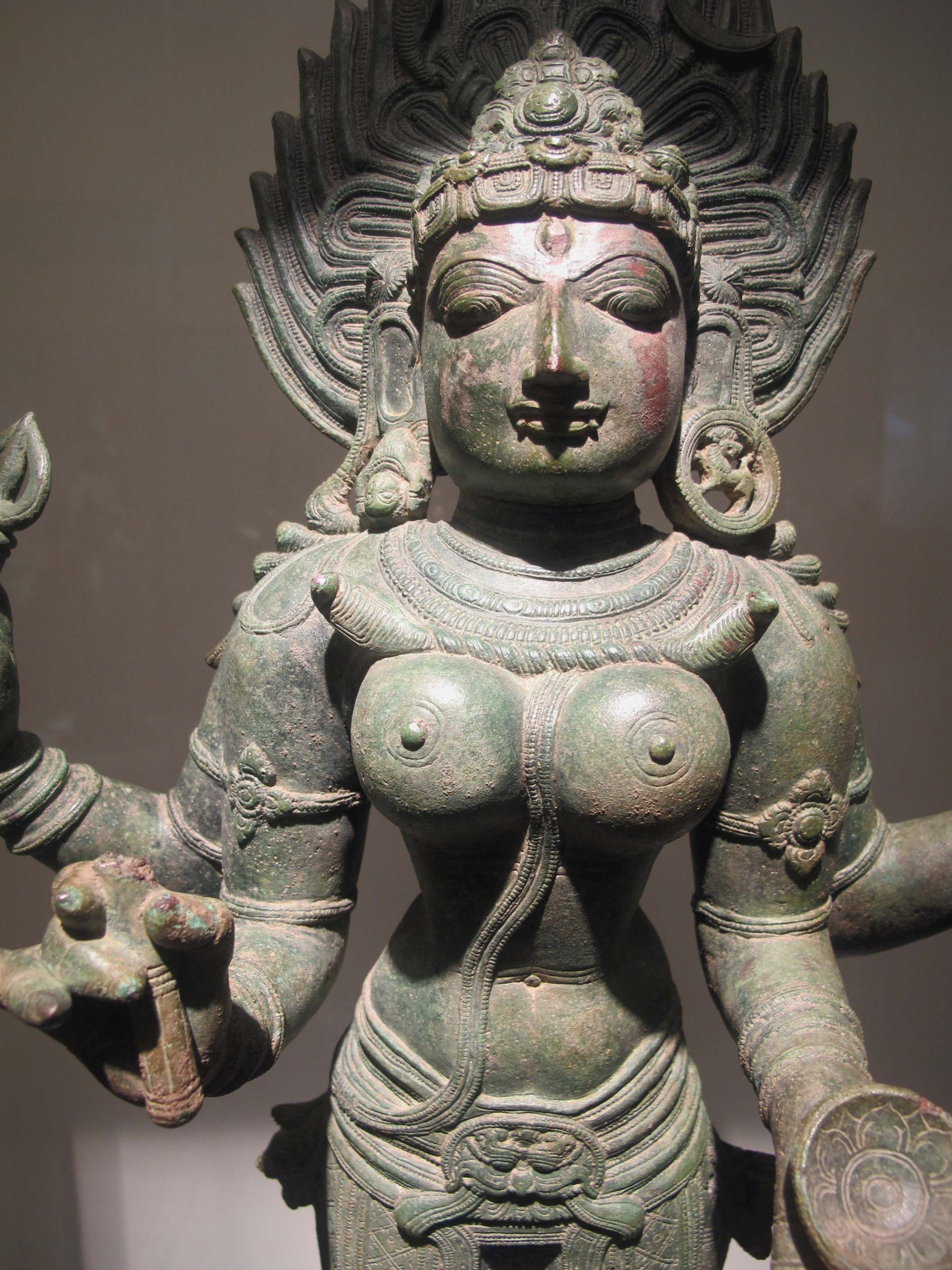 Tamil nadu, epoca cola, kali, xii sec